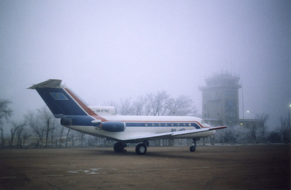 Аэропорт Крайний (зима)